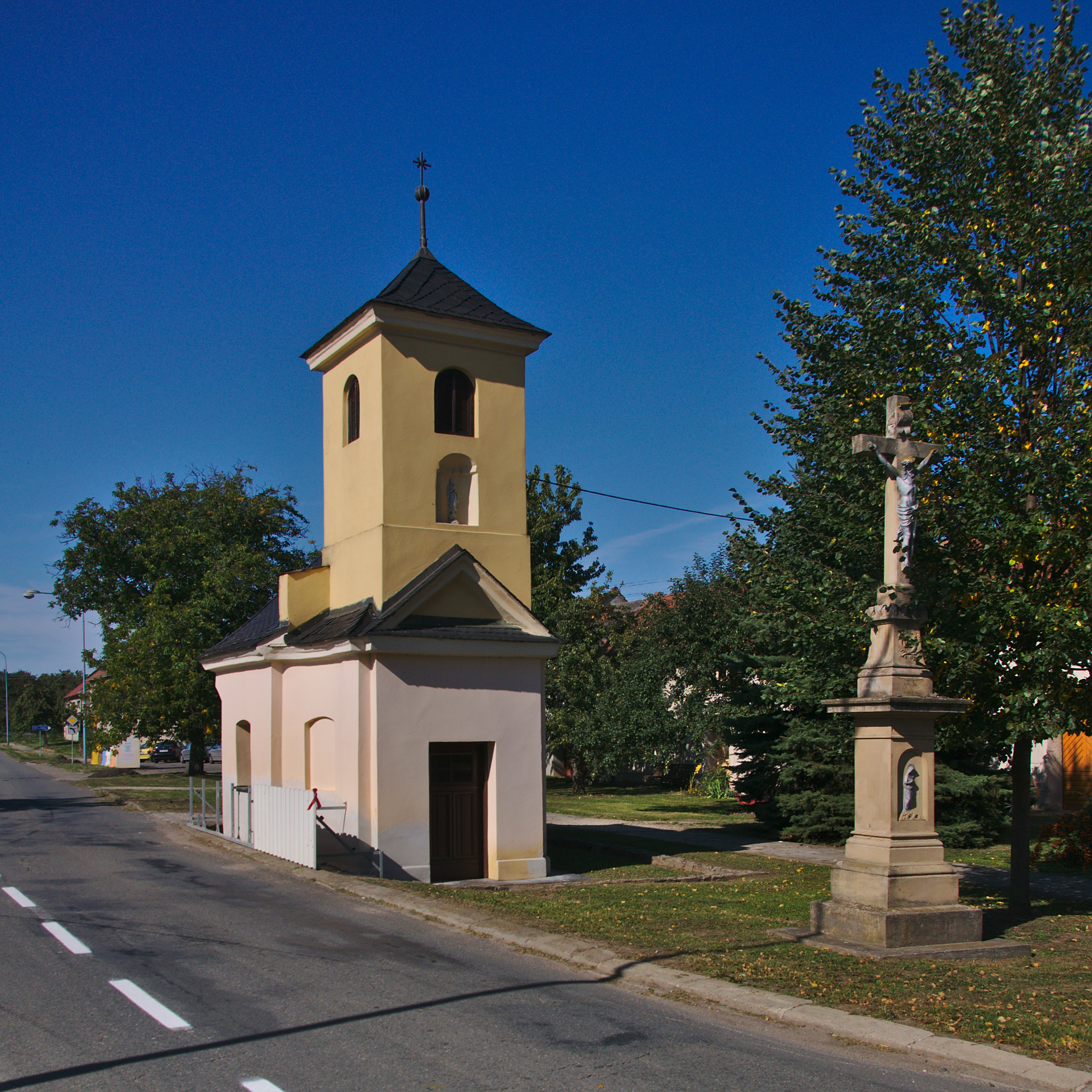 Kaple Panny Marie, Hluchov, okres Prostějov